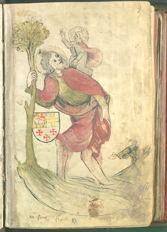 Folio 9r du manuscrit WienerHandschriftEXAv2 52z3. Il montre le blason de la confrérie.